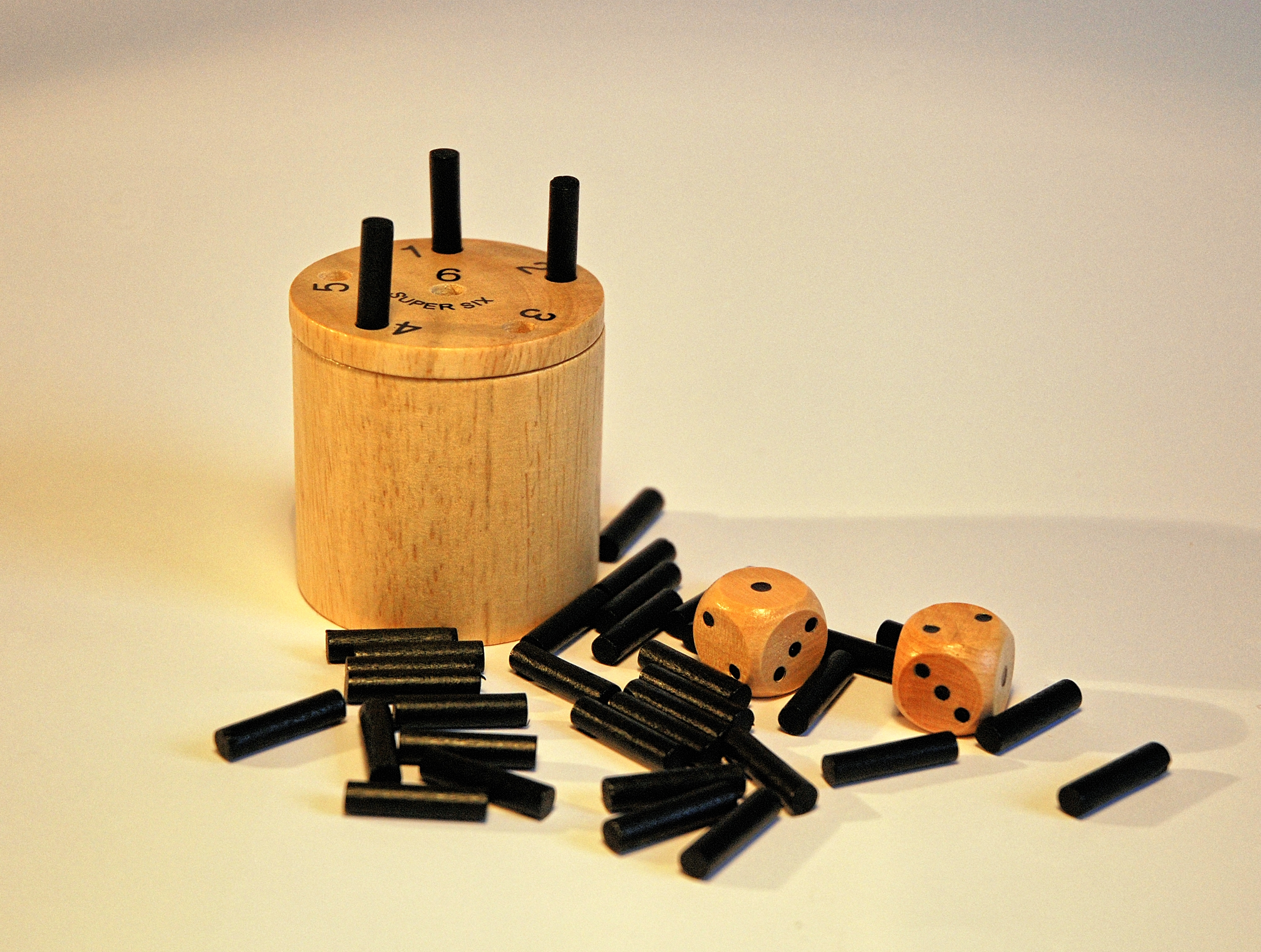 Super Six (auch "Warum immer ich!" oder "Weg mit der sechs" genannt), ein Würfelspiel. Diese Ausführung (aus Holz): Firma Grimminger aus Wäschenbeuren.